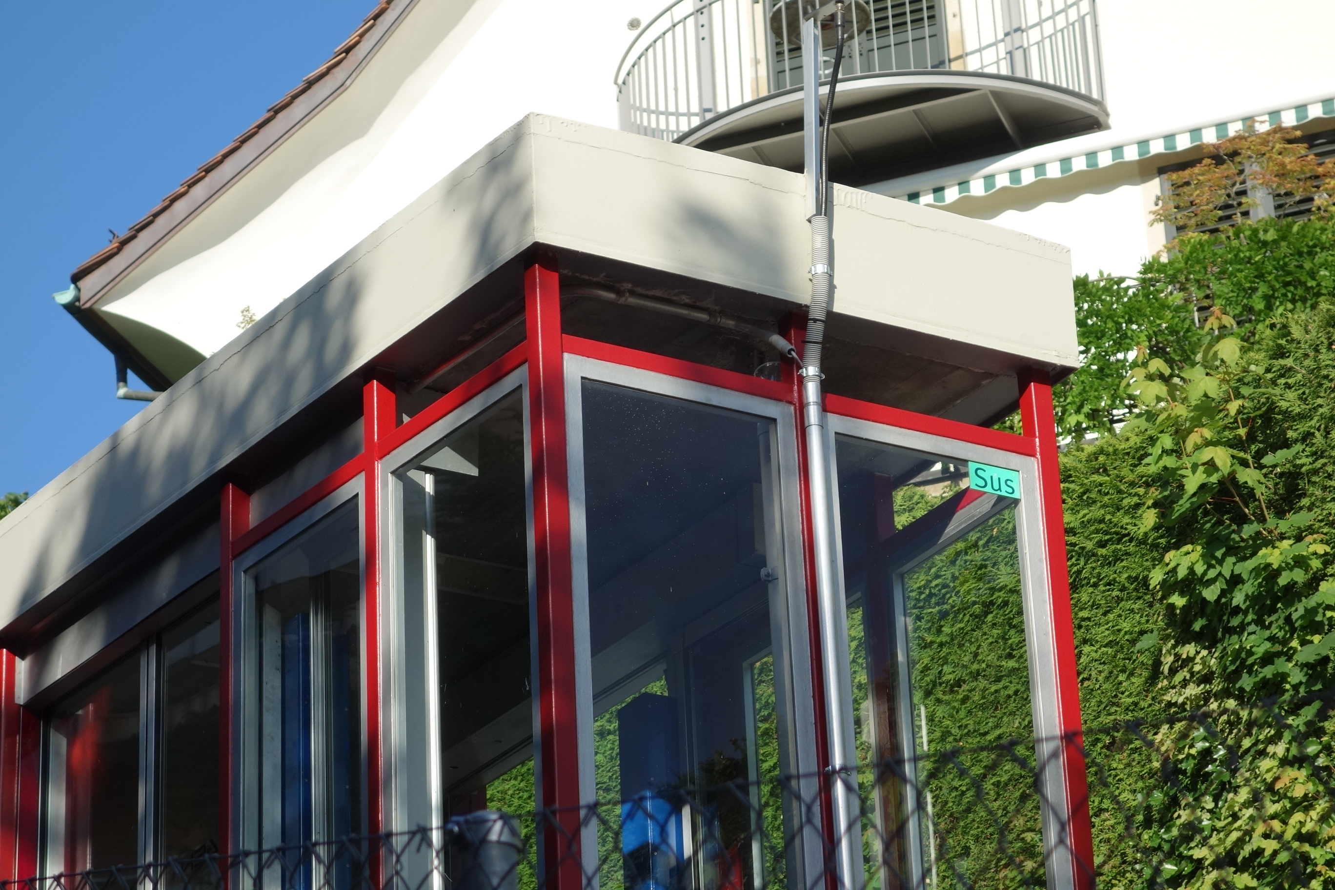 Foxtrail Ikarus Funivia, Zürich, Schweiz